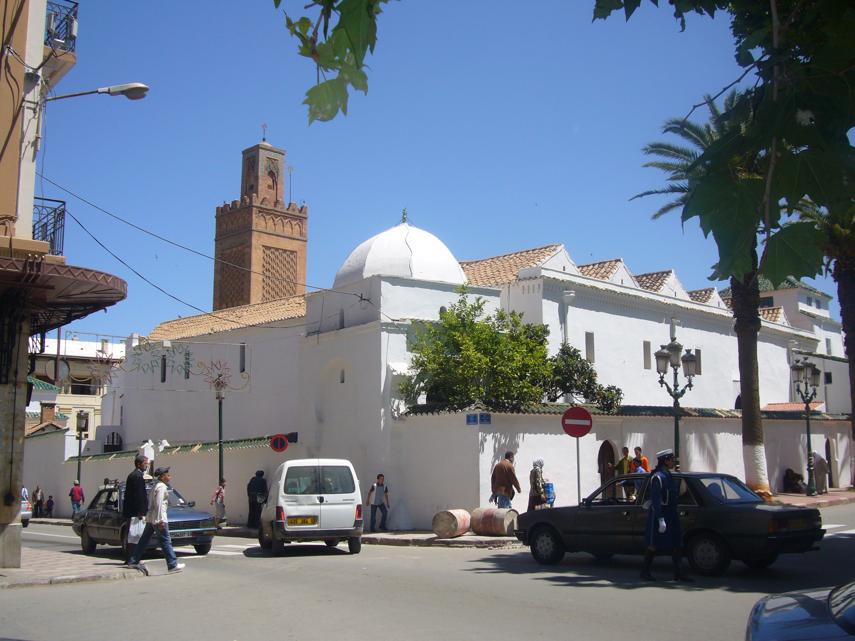 Vue d'angle de la Grande Mosquée (Tlemcen)